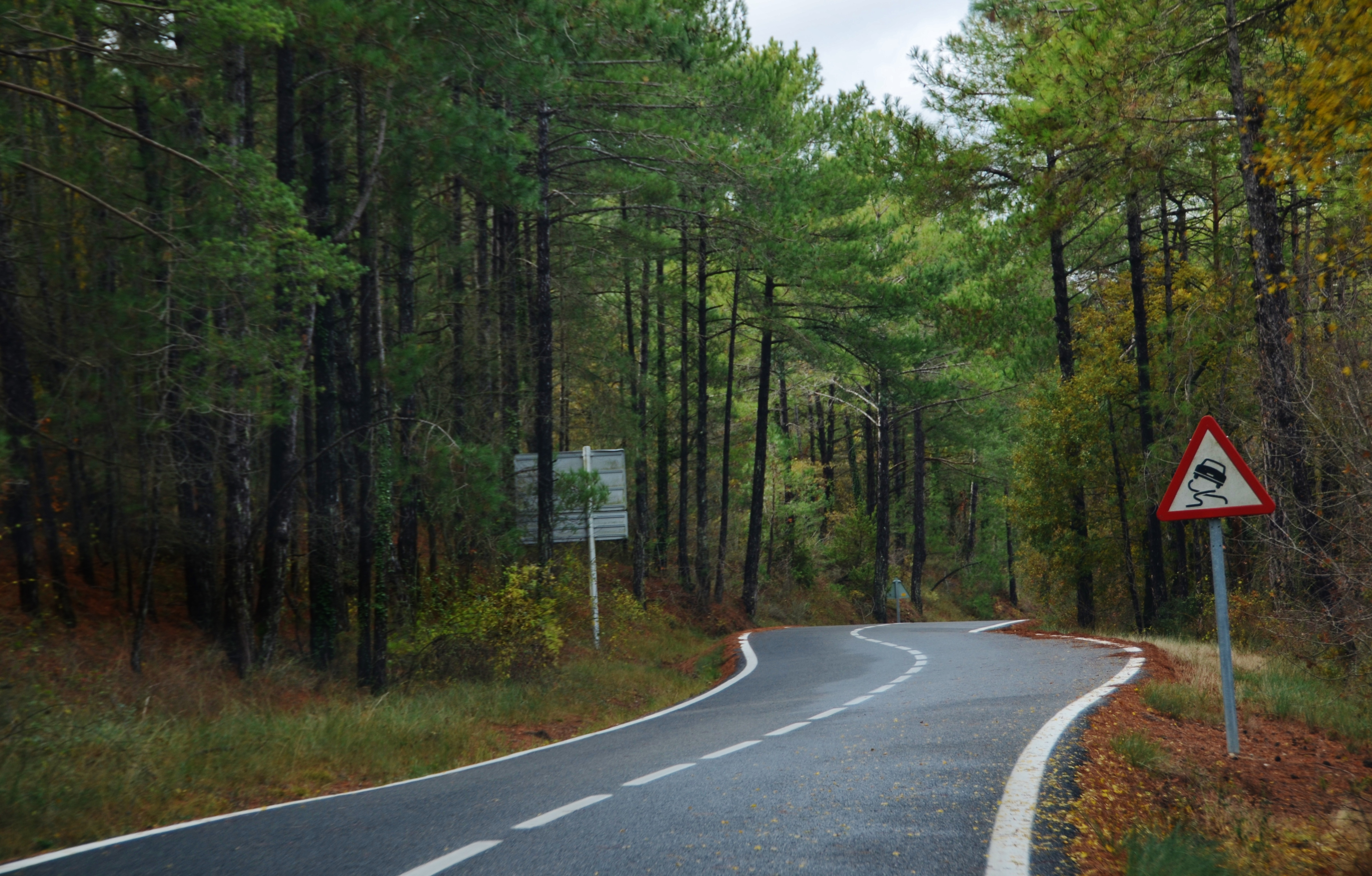 Obagues del Riu Corb This is a a photo of a natural area in Catalonia, Spain, with id: ES510148